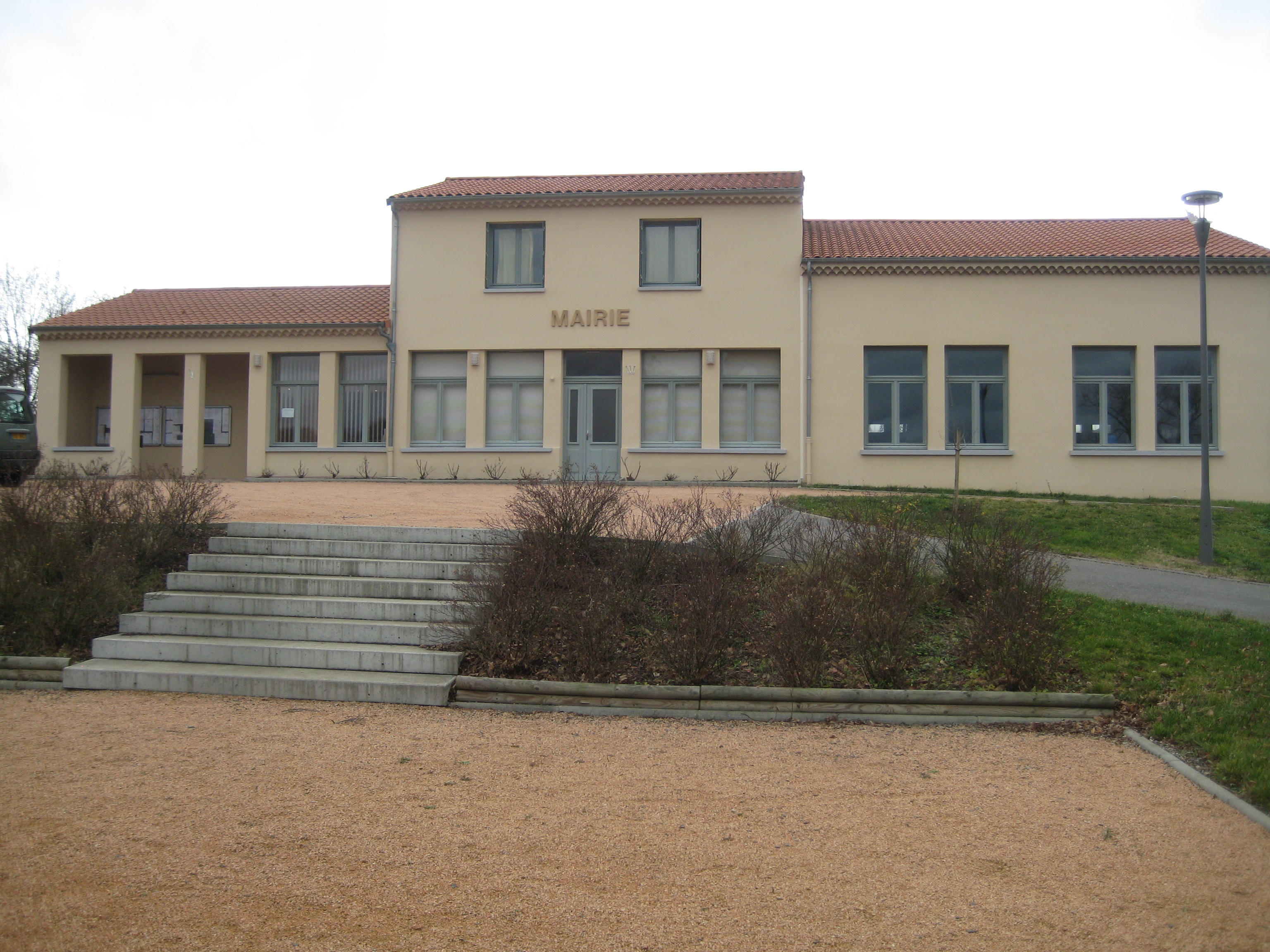 Mairie de Saint-Denis-Combarnazat